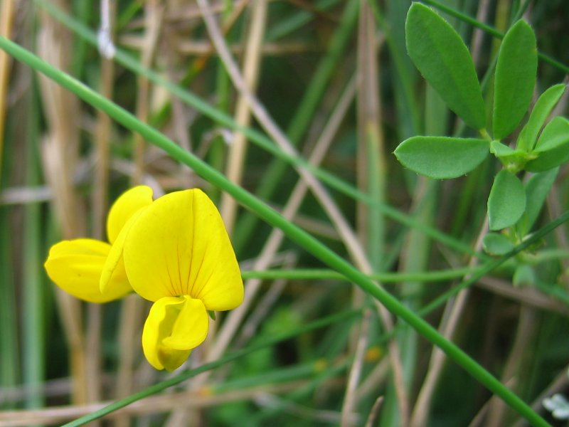 Salz-Hornklee Lotus tenuis, Wismarbucht